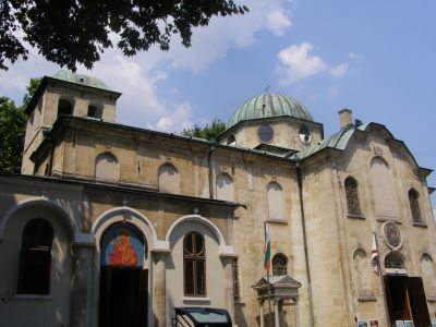 Varna, Bulgaria